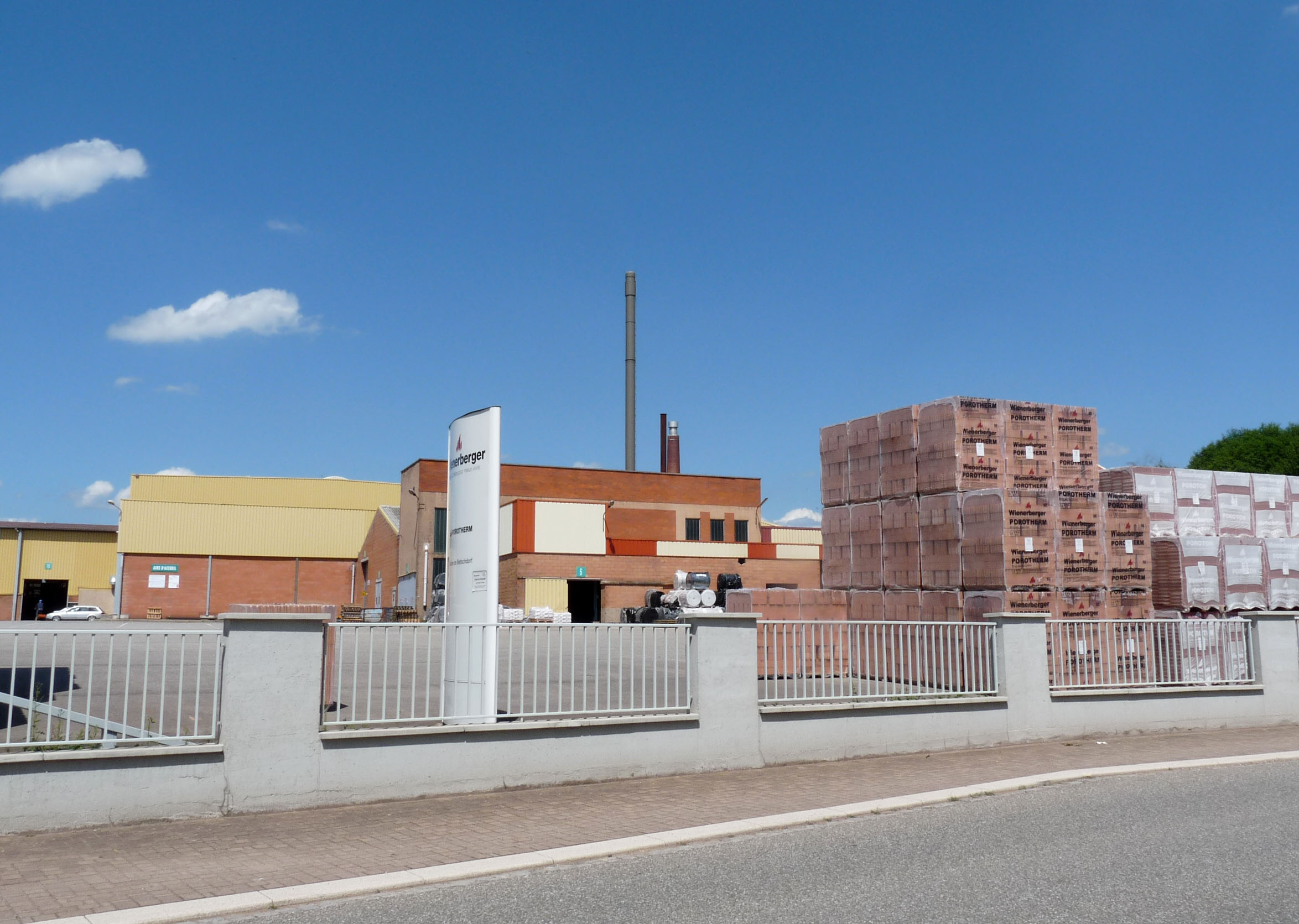 Usine de brique en terre cuite à Betschdorf (Bas-Rhin)